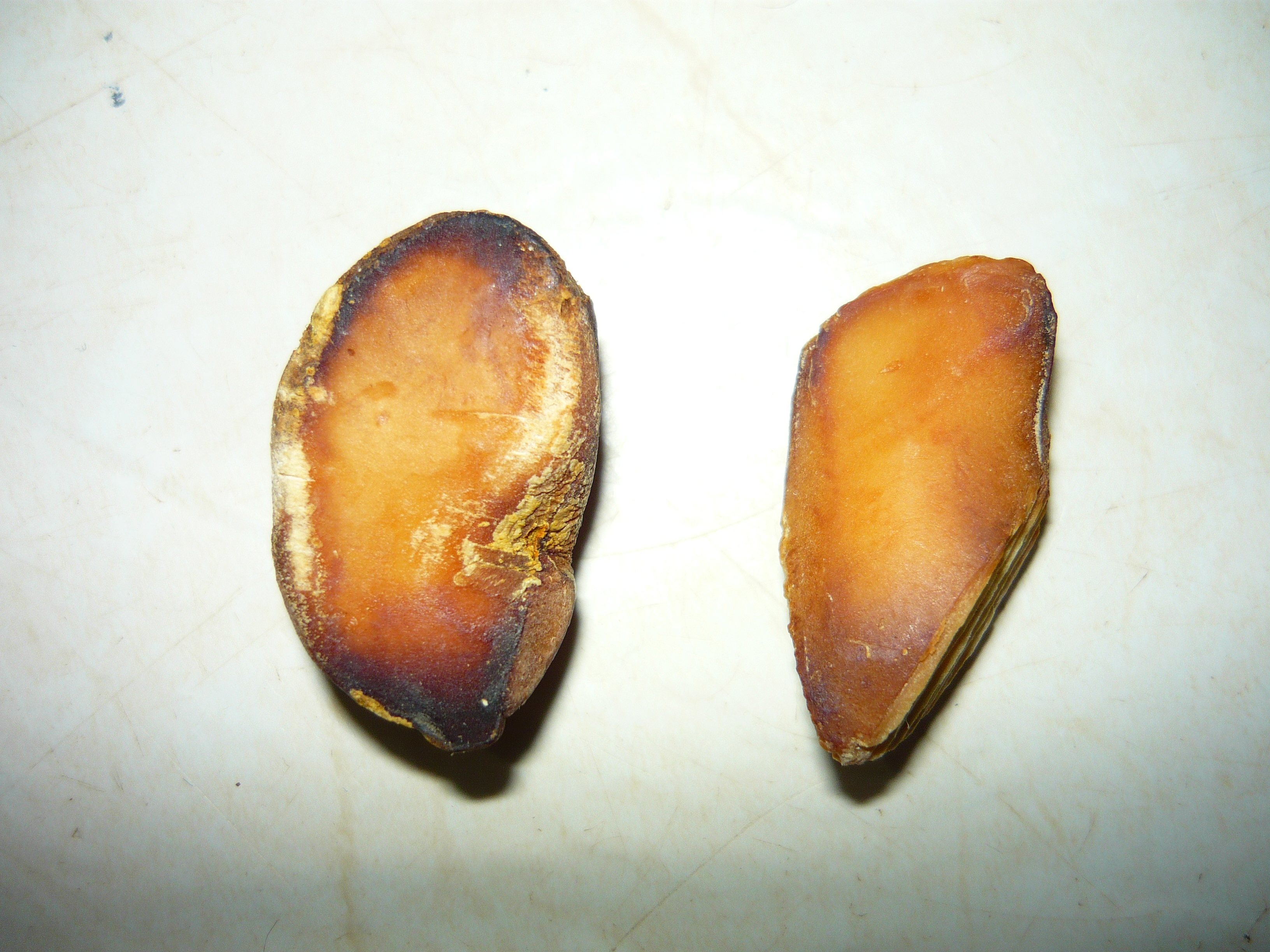 Fotografía de la semilla de cedrón. Una entera y la otra raspada. Cuando se raspa la semilla, el polvo se junta con un ungüento y al aplicarlo sirve para eliminar los piojos y pulgas.